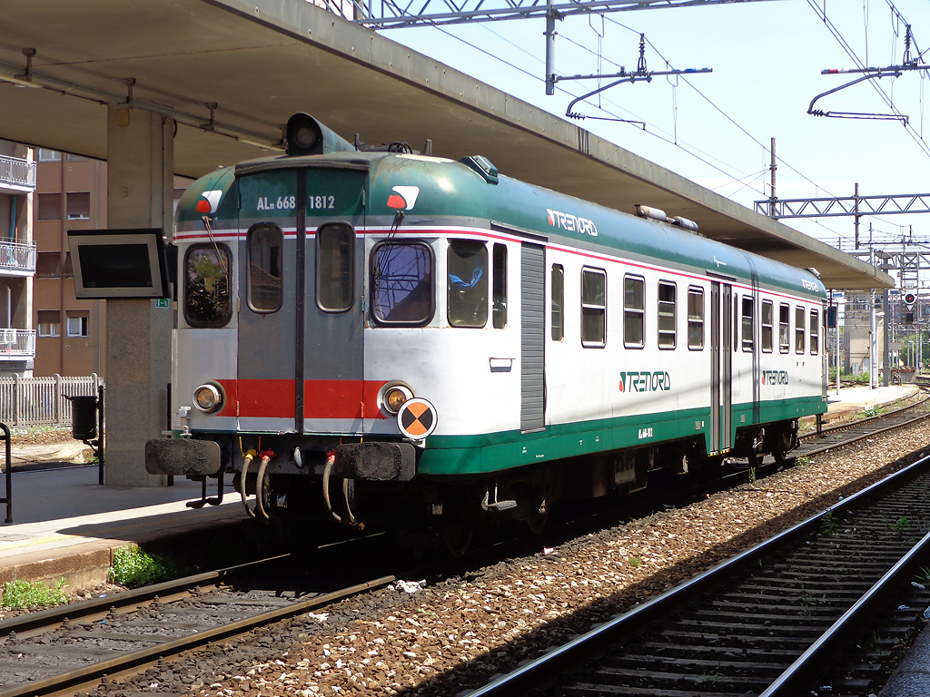 Automotrice ALn 668.1812, in livrea Trenord, in sosta nella stazione di Pavia in attesa di effettuare un treno regionale per Vercelli.